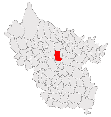 Categorie:Hărţi ale judeţului Buzău